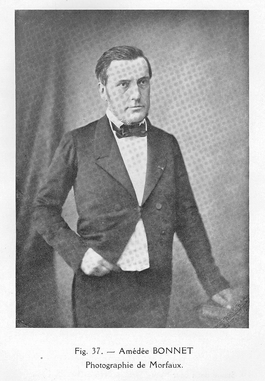 Amédée Bonnet, photographie de Morfaux